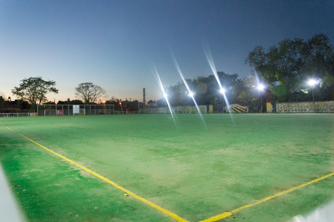 Cancha de Hockey de Almirante